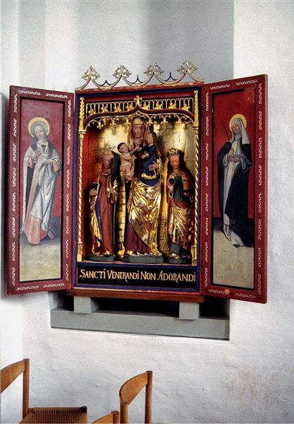 Hviding Kirke i Danmark. Sidealter